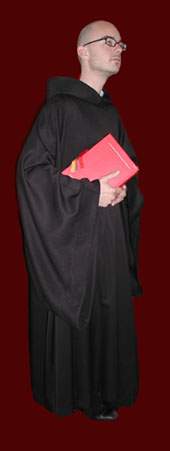 zelf gemaakt